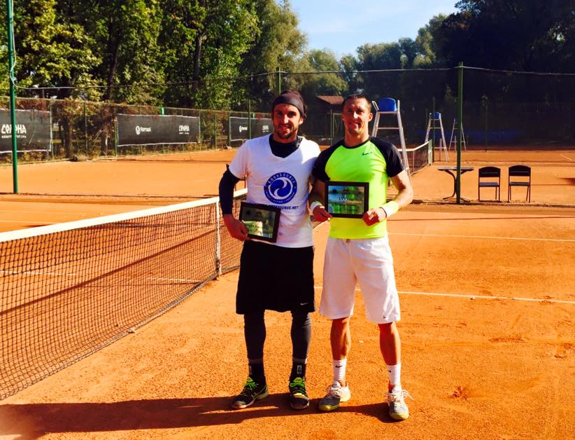 Vasko Mladenov e Ivan Nedelko después de la final en Ucrania F6